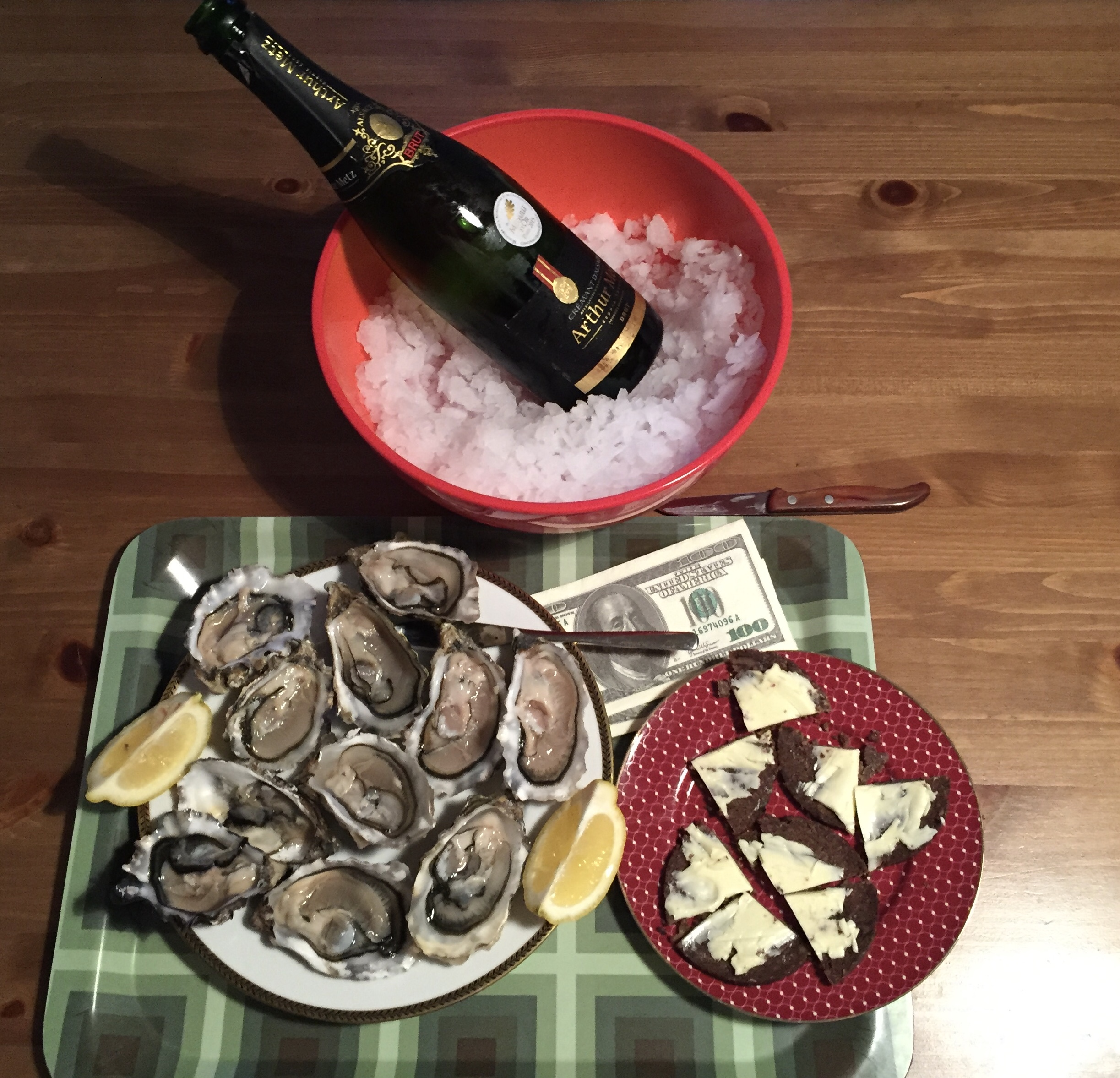 Felsenaustern mit Pumpernickel und Sekt